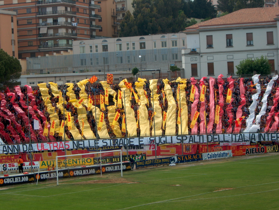 Stadio Ceravolo